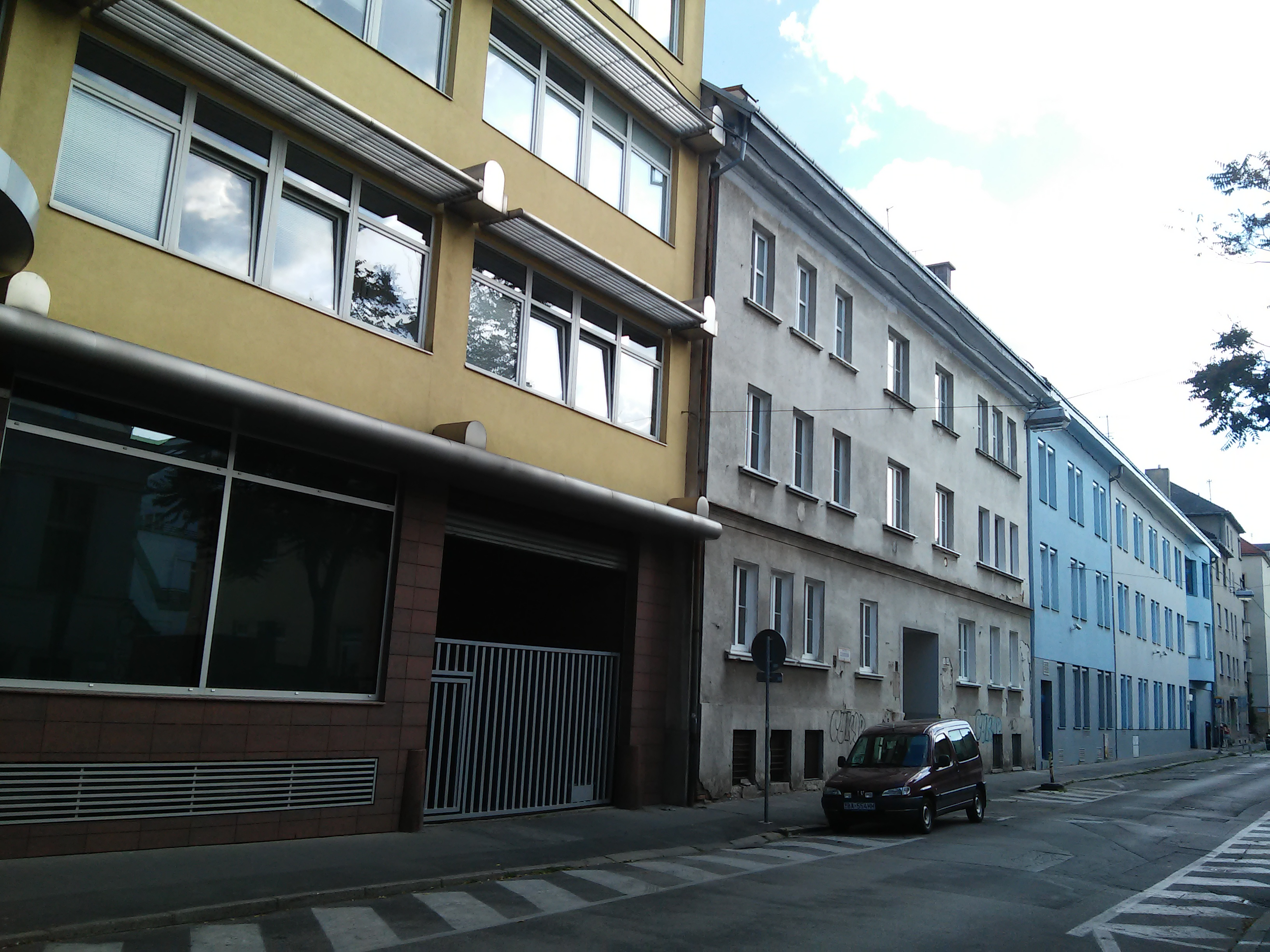 Cukrová, Staré Mesto, Bratislava